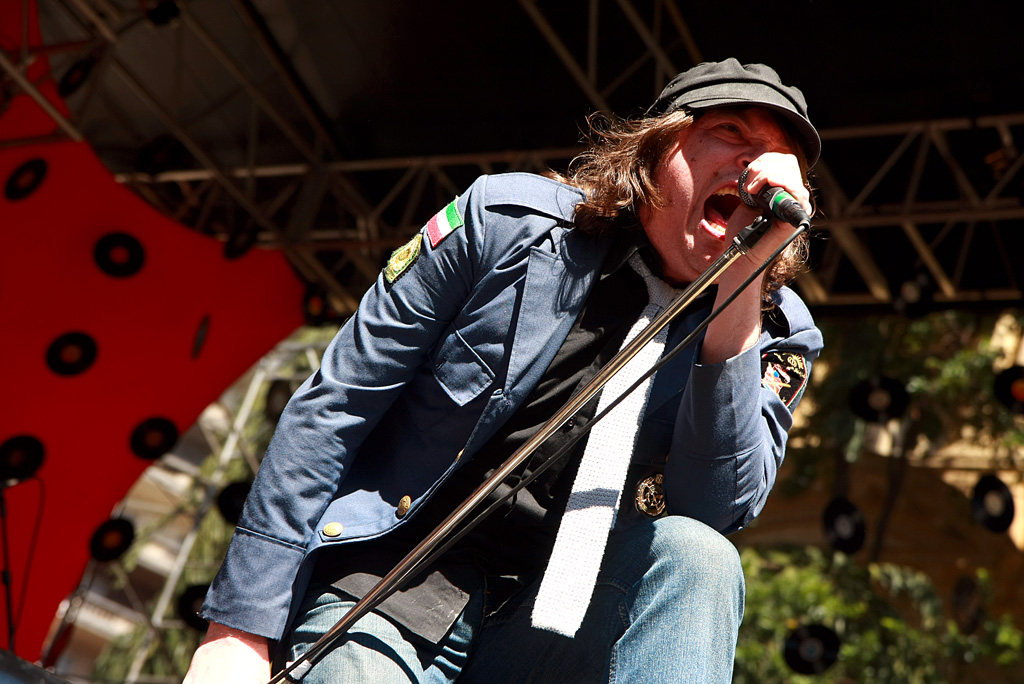 Foto: Caio Paganotti